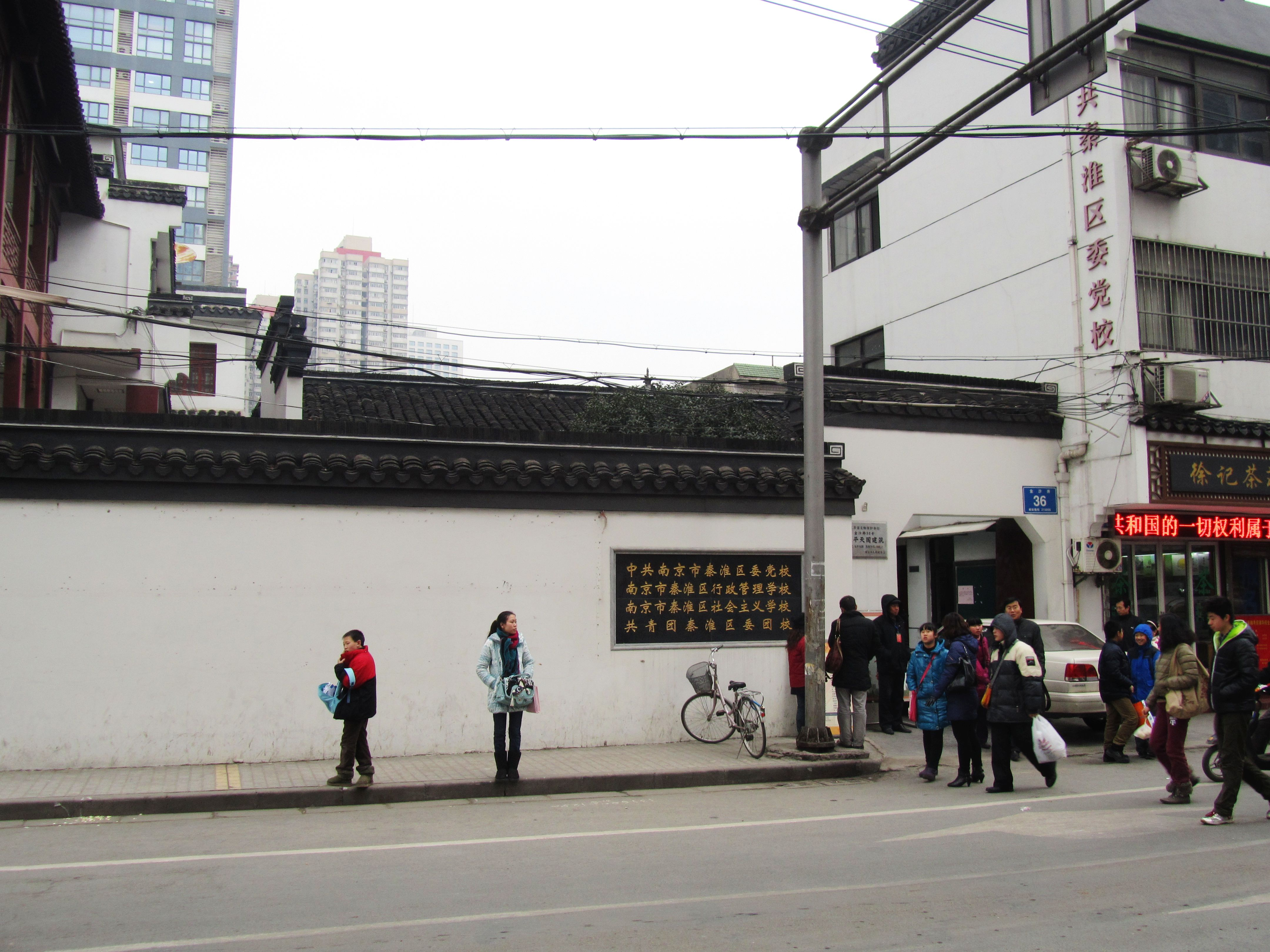 南京金沙井36号太平天国建筑。